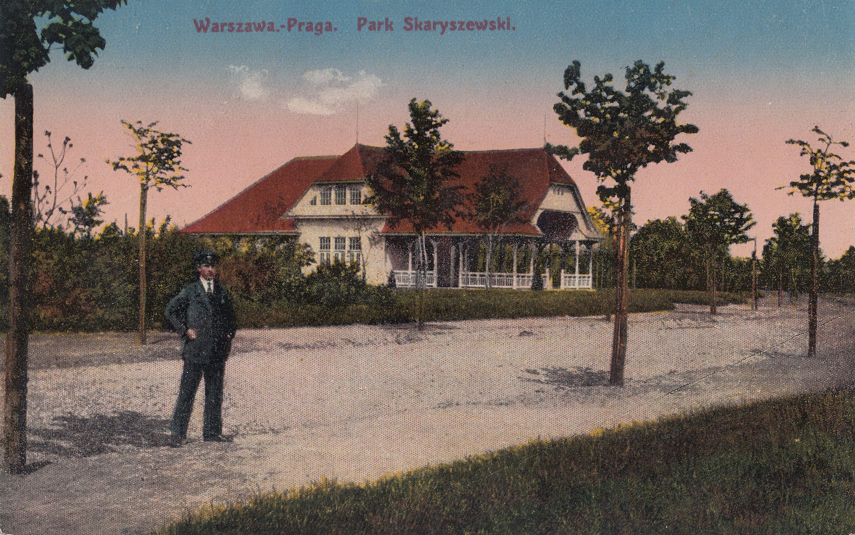 Park Skaryszewski w Warszawie